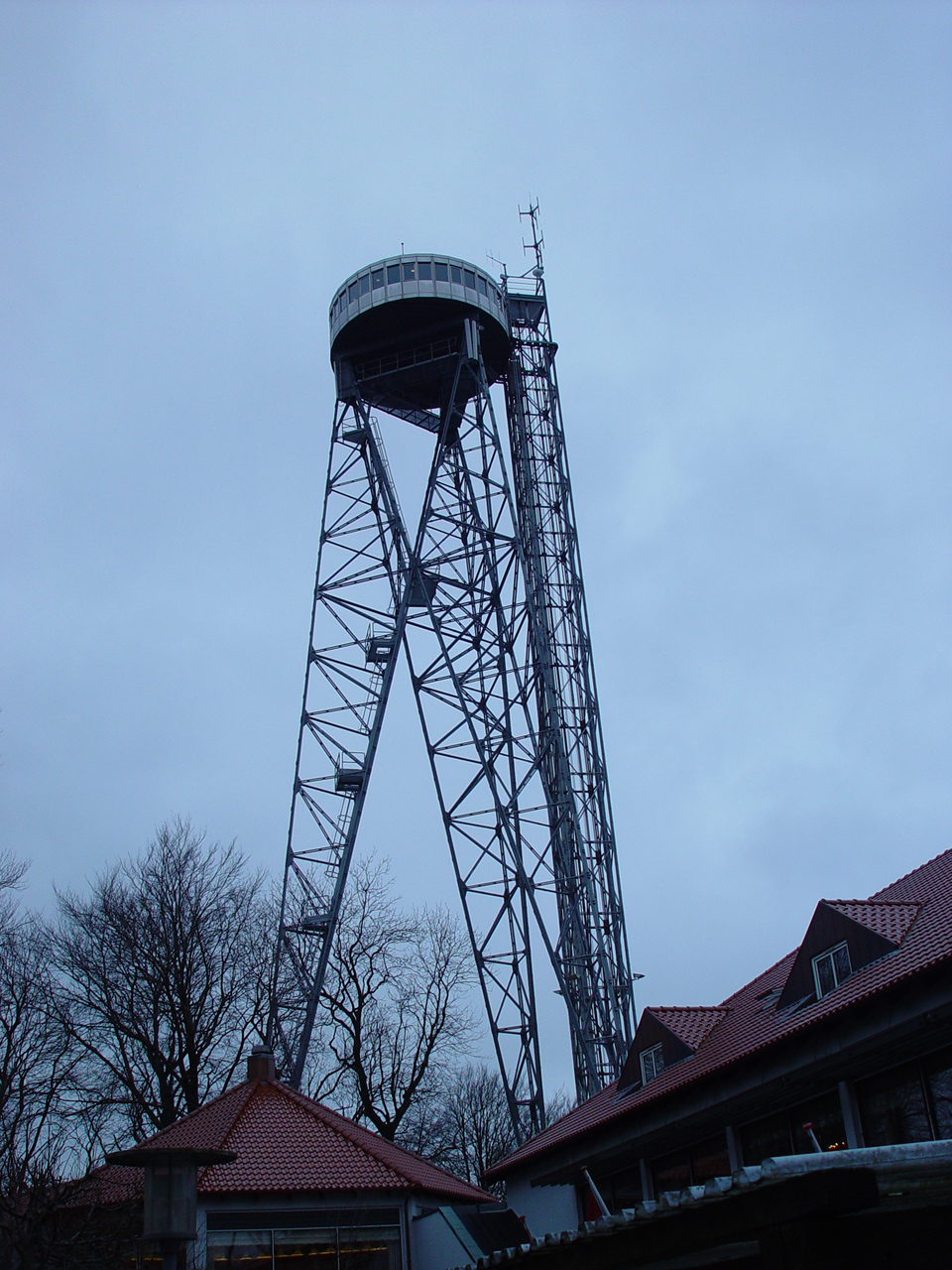 Ålborg tårn i Danmark.